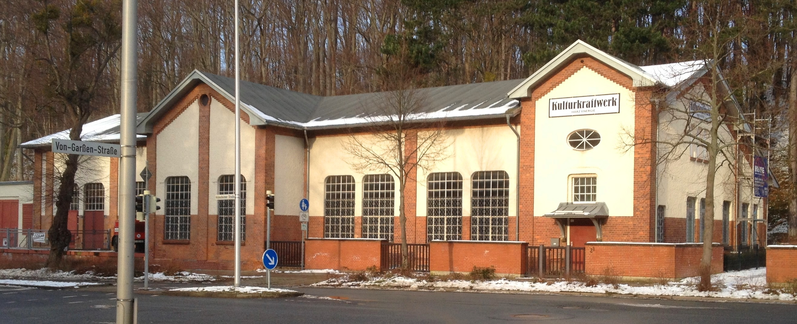 Kulturkraftwerk Goslar, ehemaliges Elektrizitätswerk aus der Amtszeit des Bürgermeisters Georg von Garßen; Straßenschild Von-Garßen-Straße (Einmündung Hildesheimer Straße)